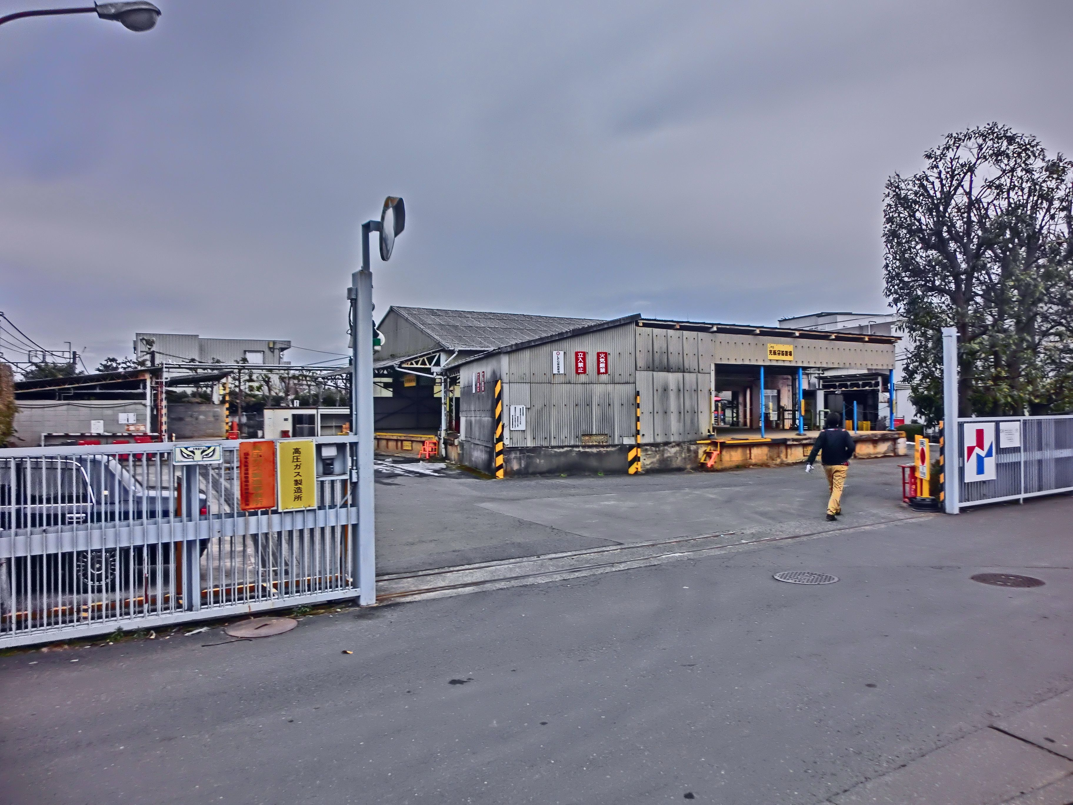 日本ガス田無工場